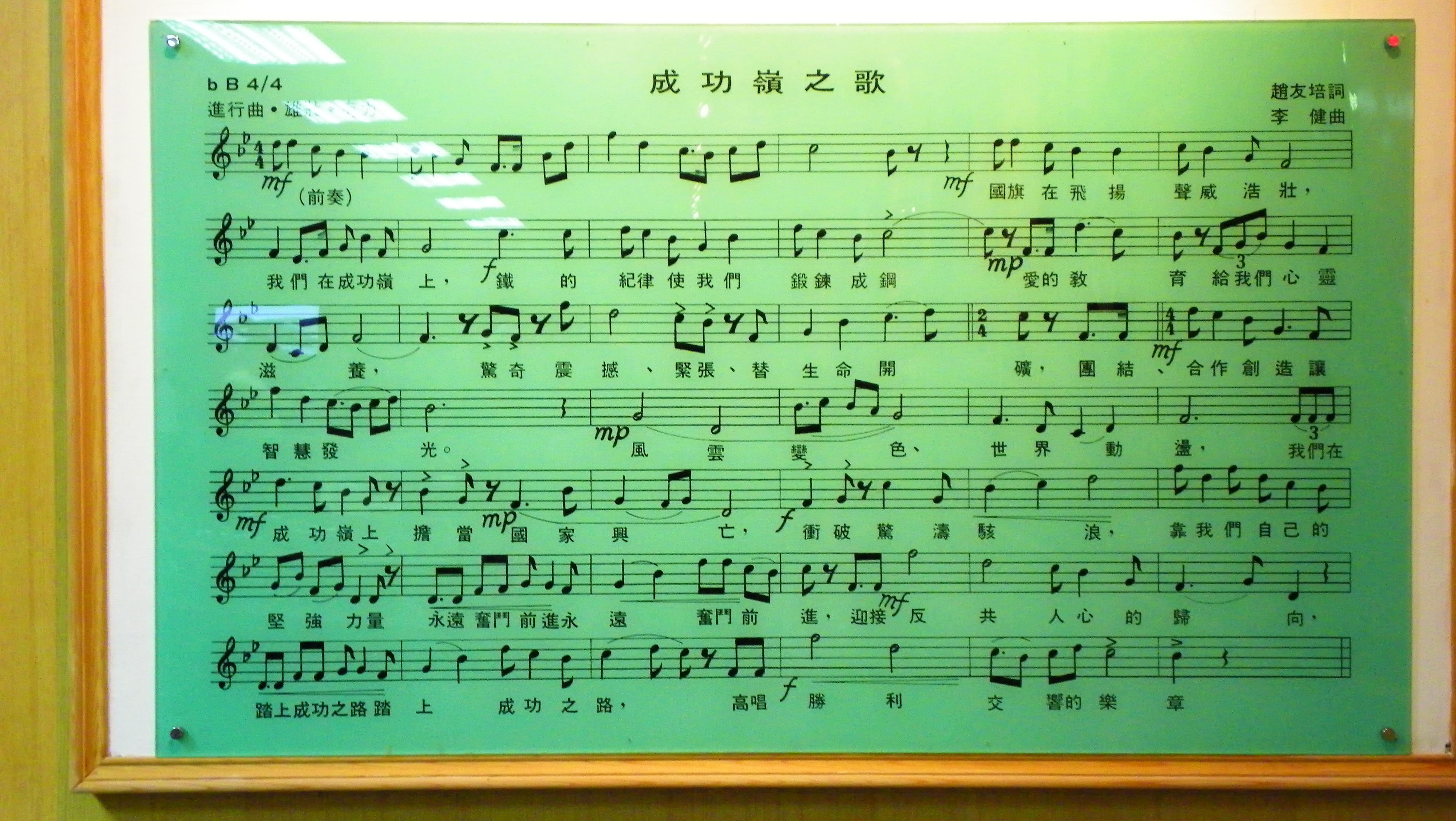 成功嶺隊史館壁面展示的成功嶺之歌樂譜。